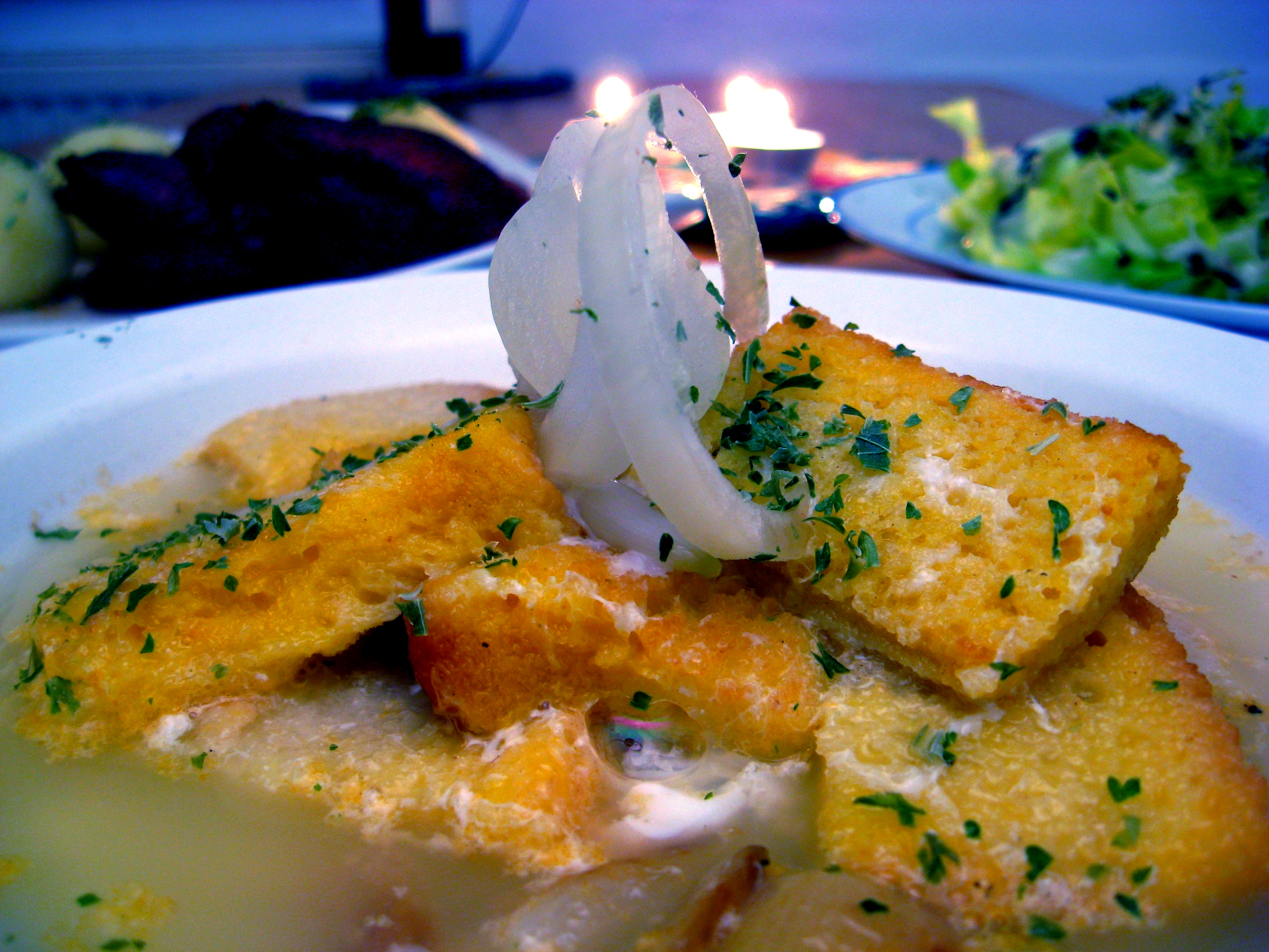 Tourin (Knoblachsuppe), Entenbraten mit Knödel, Salat